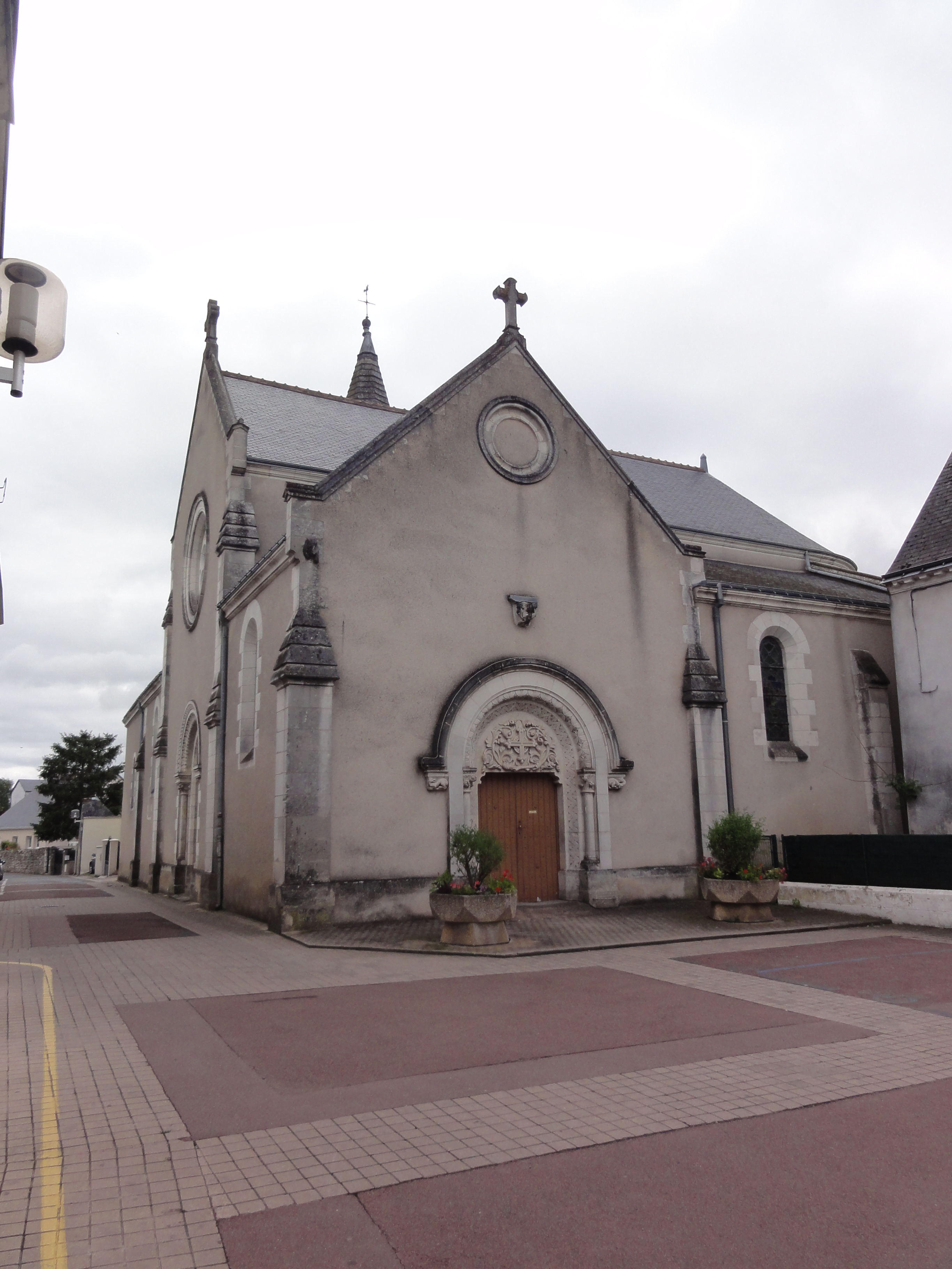 Église Saint-Pierre-ès-Liens de Sorigny (Indre-et-Loire)